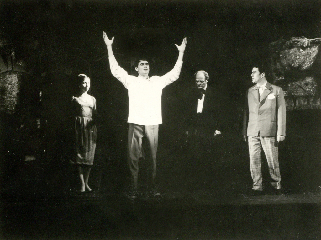 Dominik Smole, Antigona, Oder 57. Na fotografiji: Iva Zupančič (Ismena), Danilo Benedičič (Paž), Branko Miklavc (Teirezias), Brane Ivanc (Hajmon).